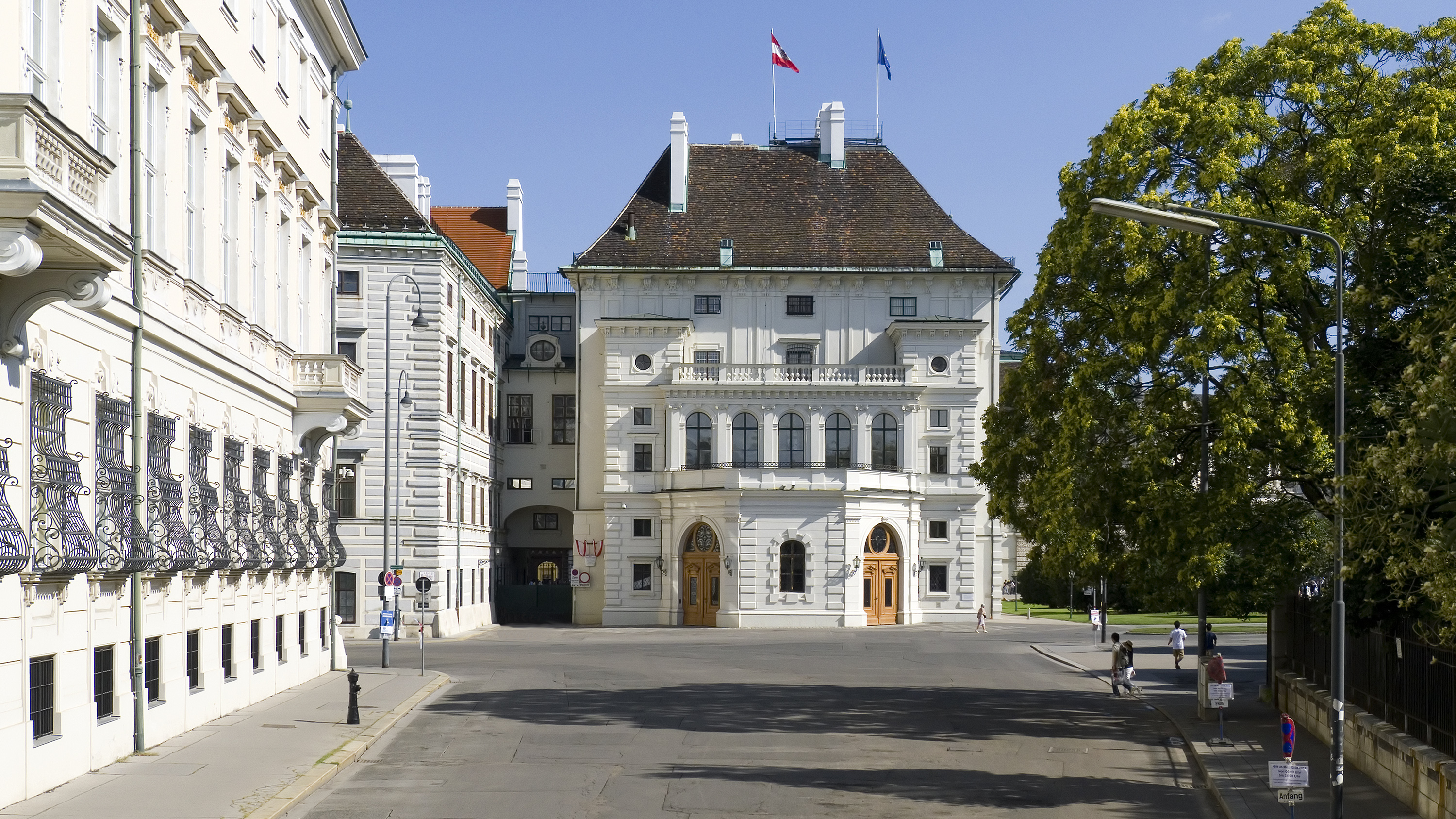 Ballhausplatz in Wien 1 bei Löwelstraße 4 Richtung Südosten